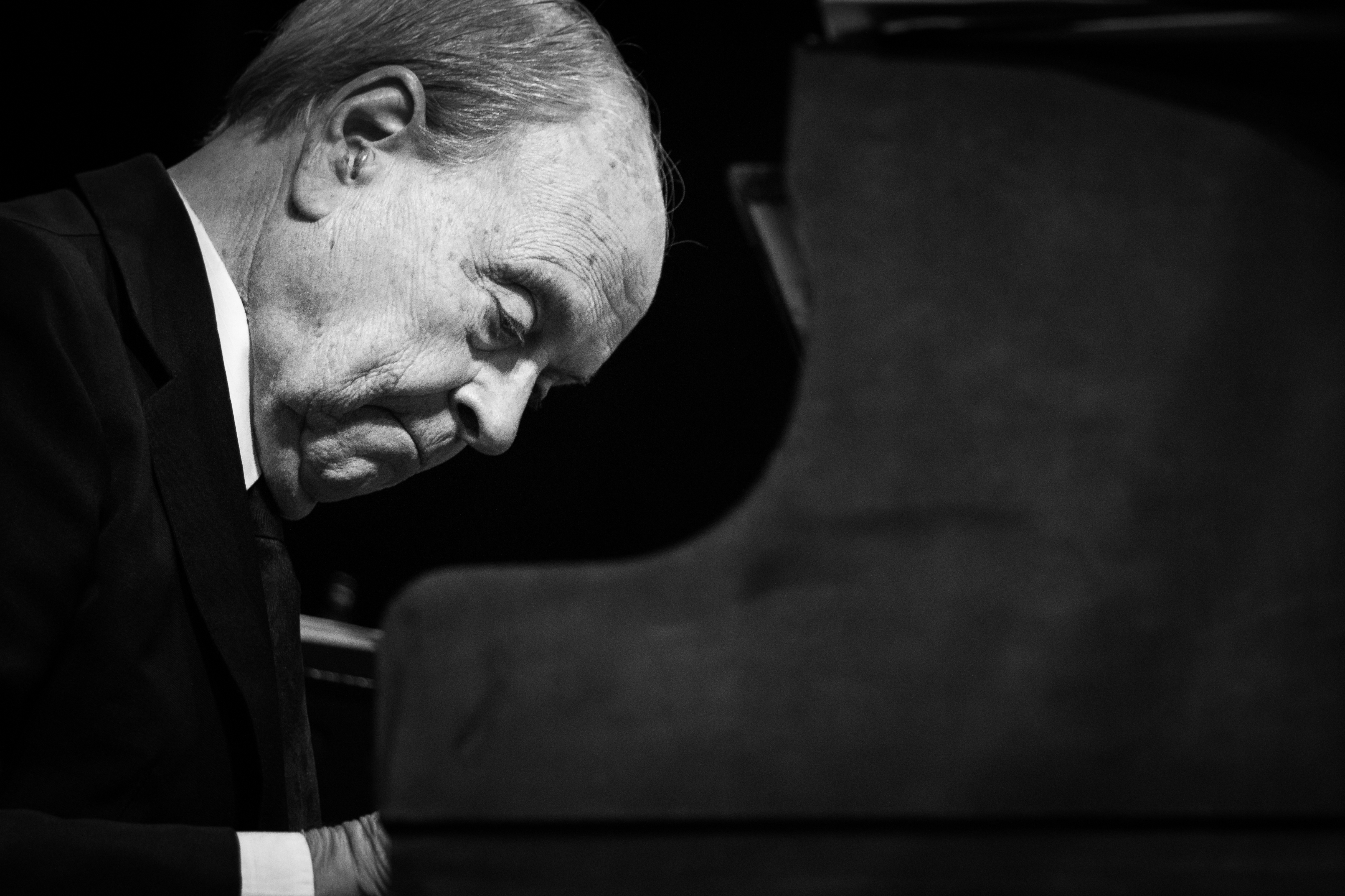 El músico argentino Atilio Stampone durante una presentación en el Teatro del Globo de Buenos Aires junto a la Orquesta Nacional de Música Argentina "Juan de Dios Filiberto".